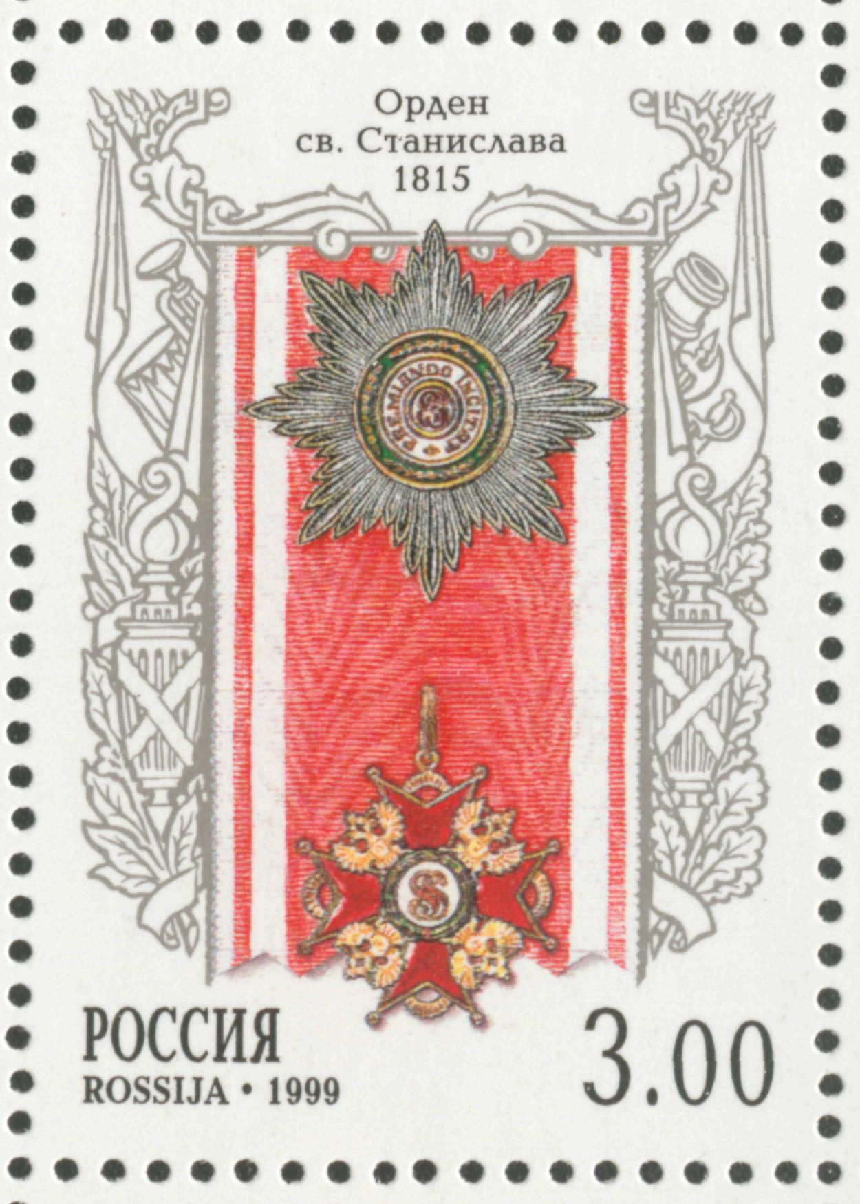 Ордена Российской Империи. Орден Станислава. Из малого марочного листа России из пяти марок 1999 года.